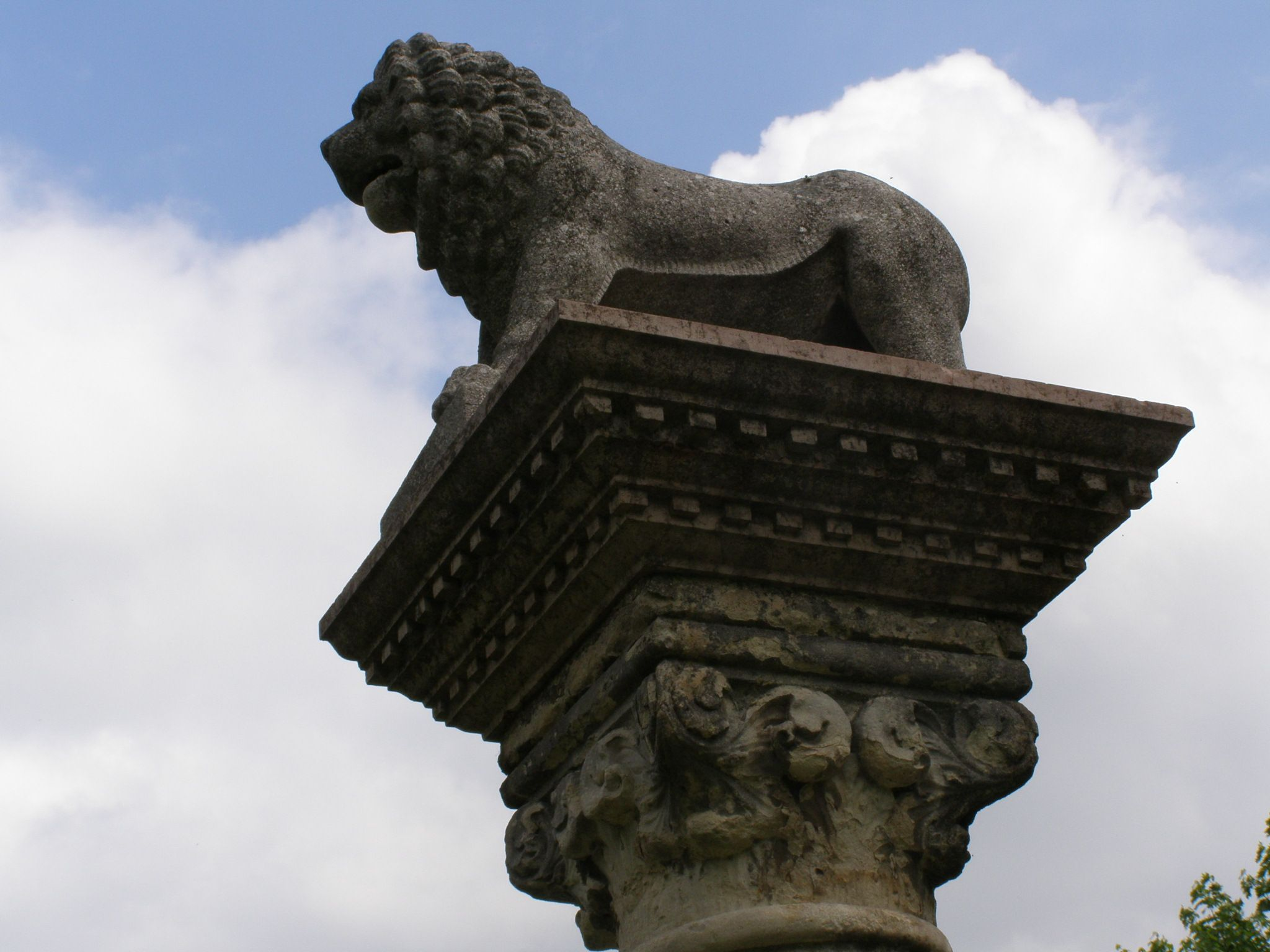 Rusovce - kaštieľ, plastika leva v parku pred kaštieľom